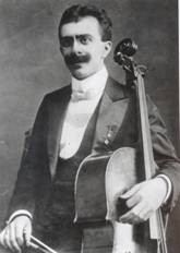 Bedřich Váška (1879 - 1979), Český violoncellista.